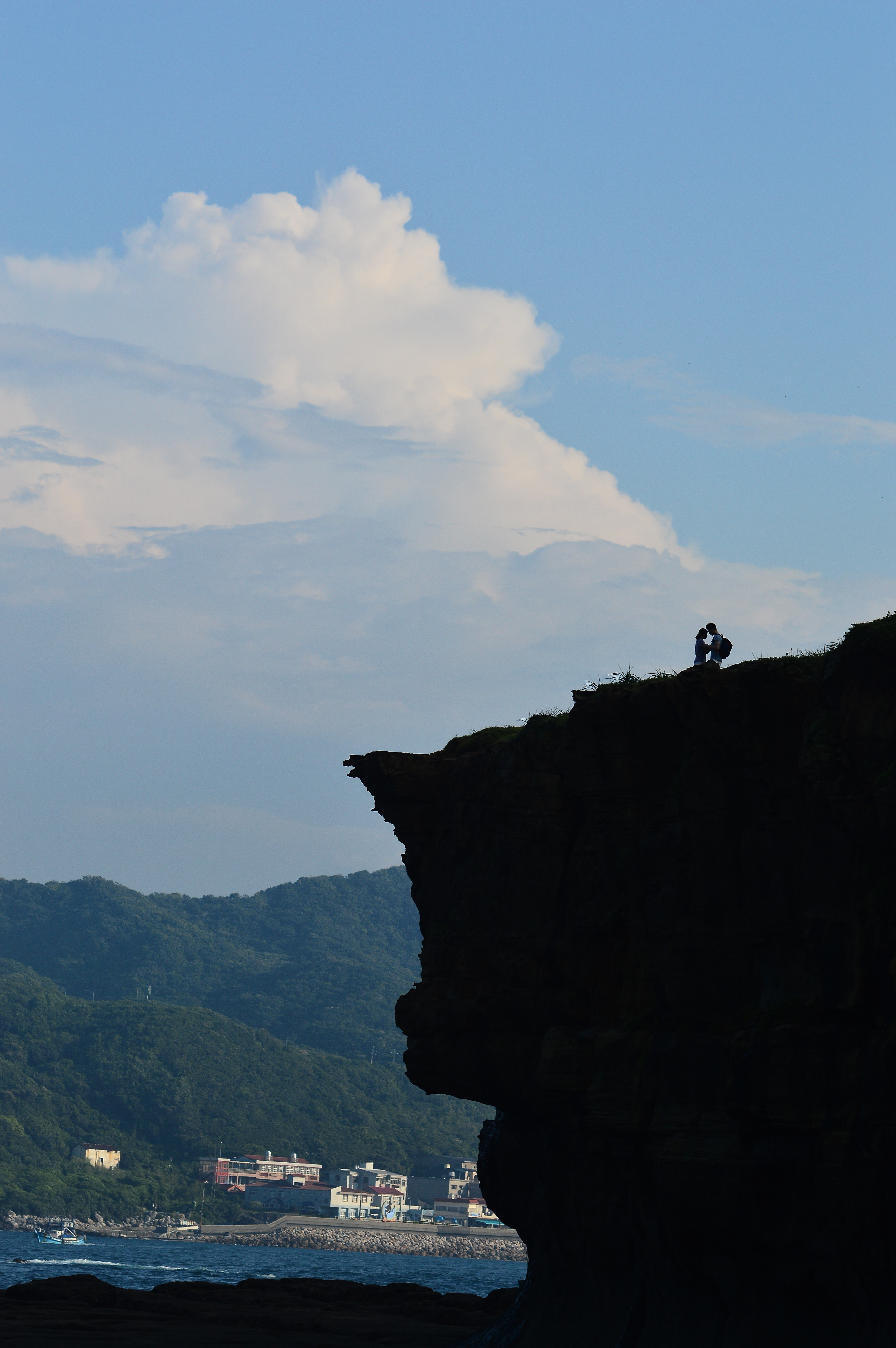 鼻頭角 斷崖地形